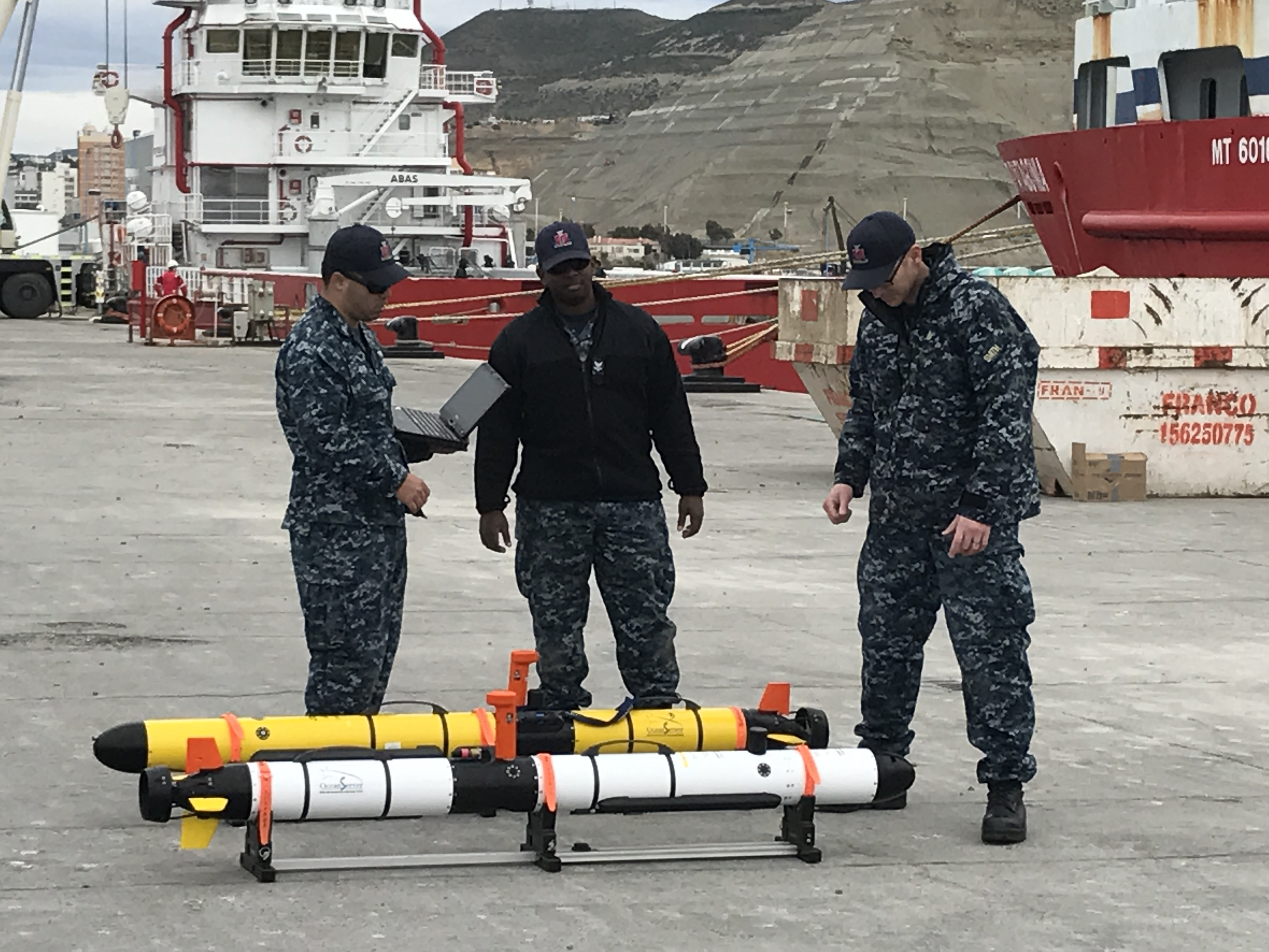 Vehículos submarinos no tripulados de la Armada Estadounidense durante la búsqueda del submarino argentino ARA San Juan